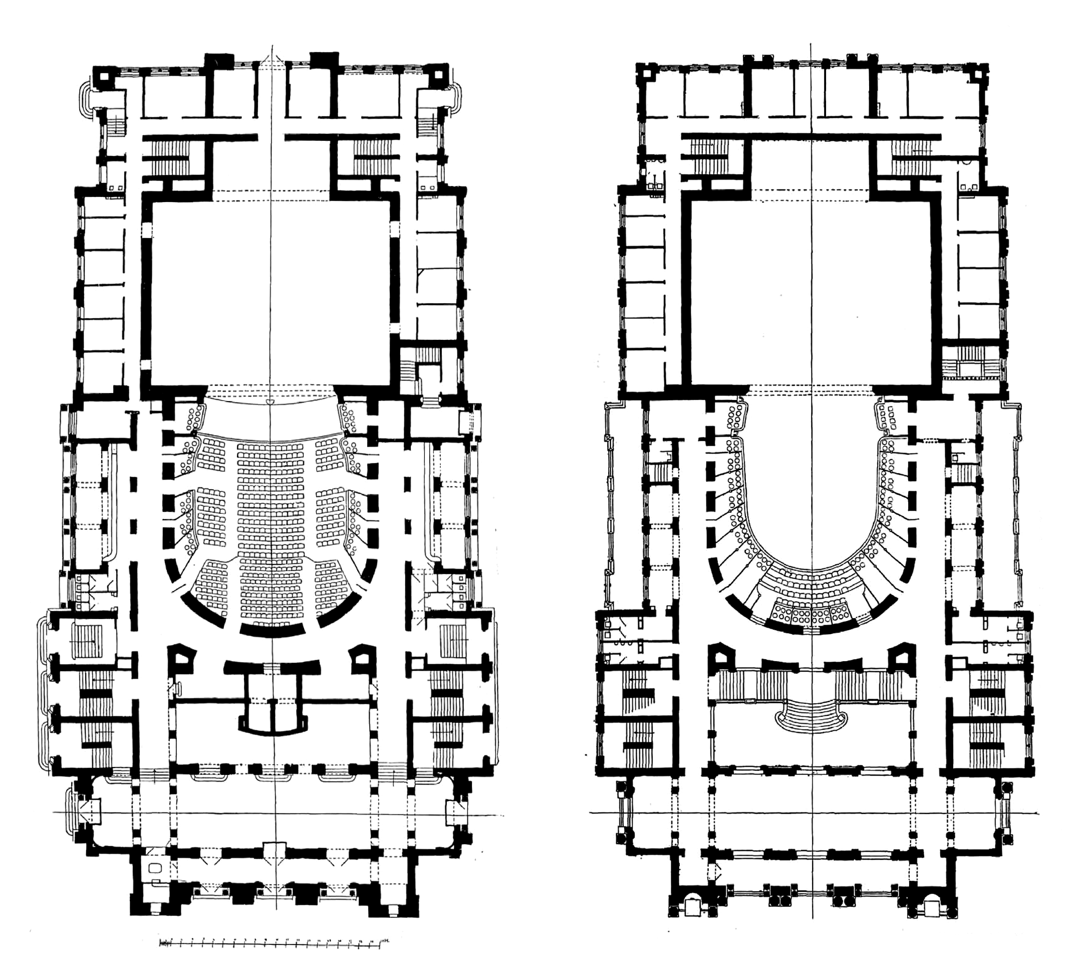 Великий міський театр у Львові. План першого і другого поверху. Архітектор Зиґмунт Ґорґолевський.